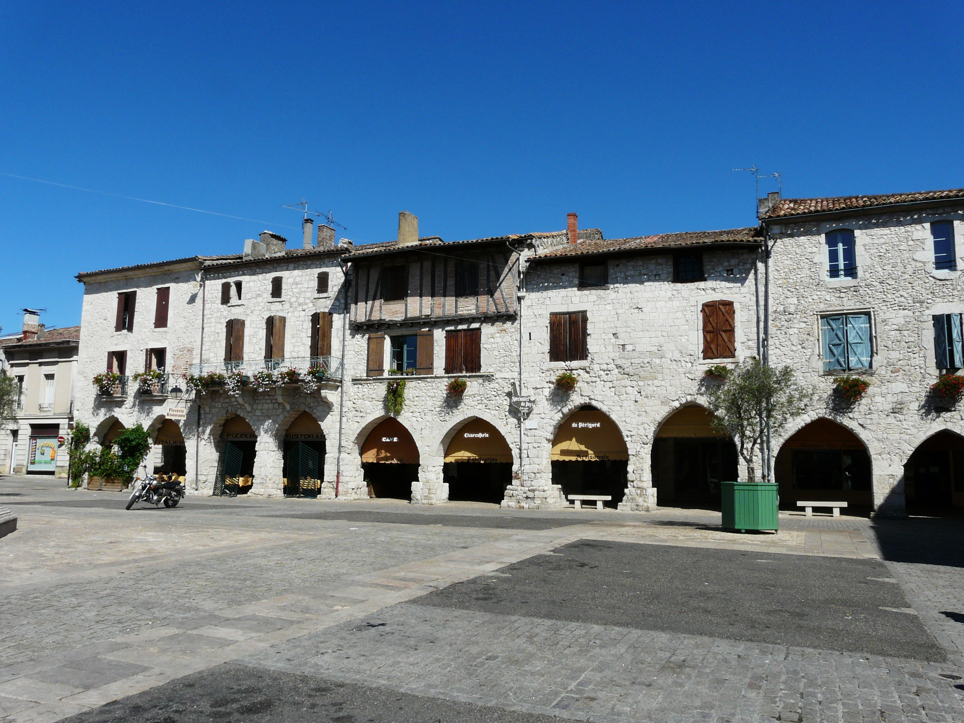 Arcades de la place Gambetta, Eymet, Dordogne, France